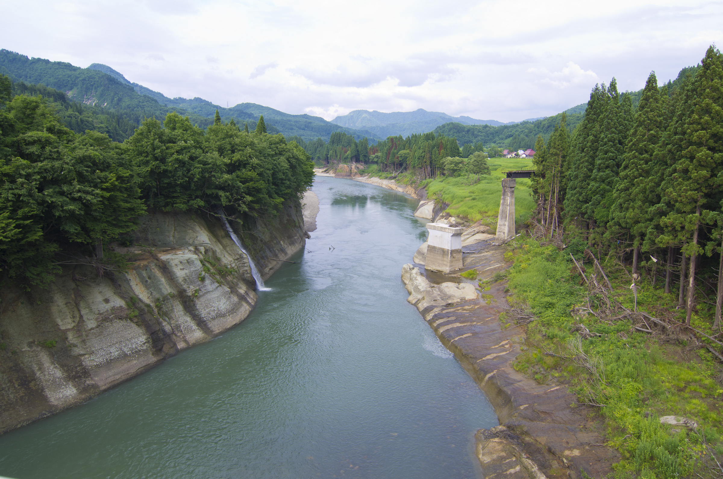 JR只見線第七只見川橋梁（平成23年新潟・福島豪雨により流出後）